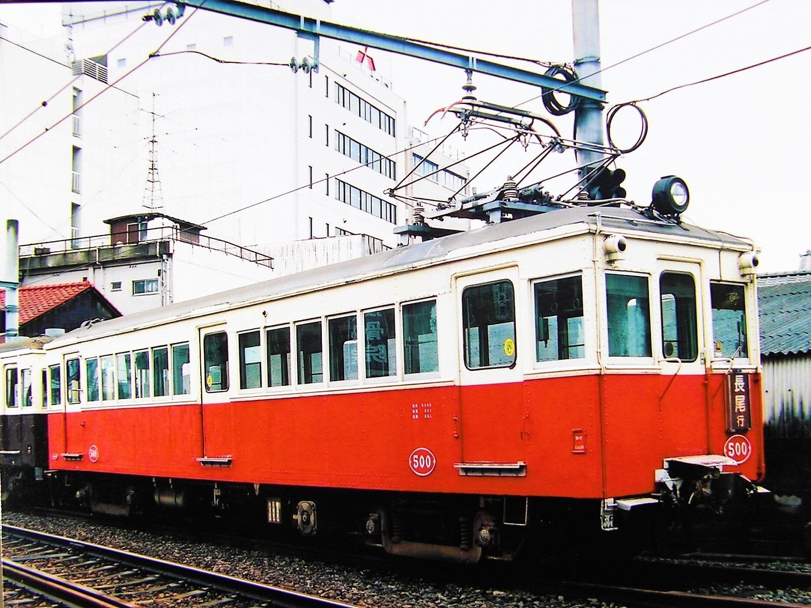 高松琴平電気鉄道5000形電車500号